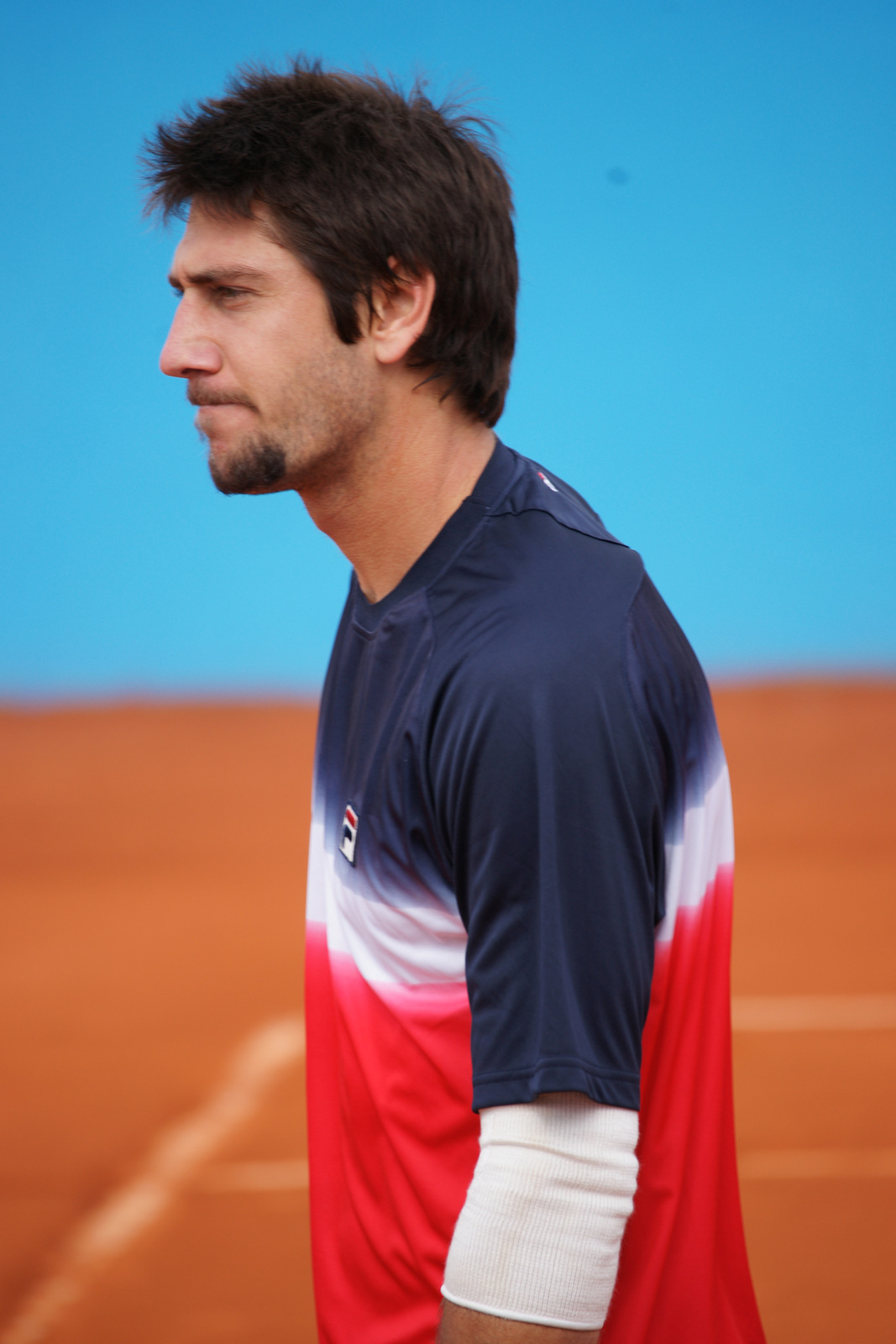 Carsten Ball, Open Nice 2012